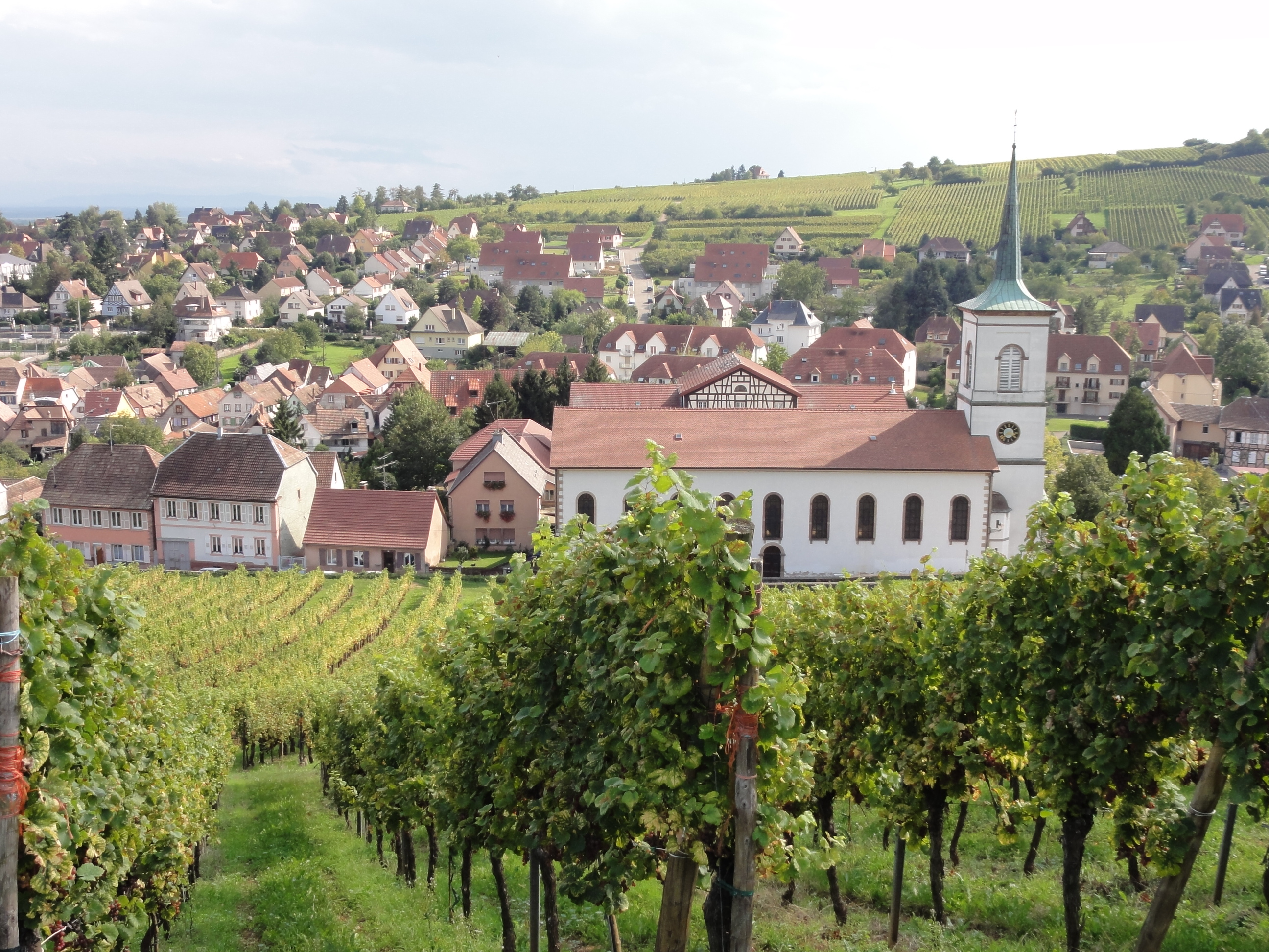 Alsace, Bas-Rhin, Barr, Vue de la ville à partir des côteaux, Église catholique Saint-Martin.